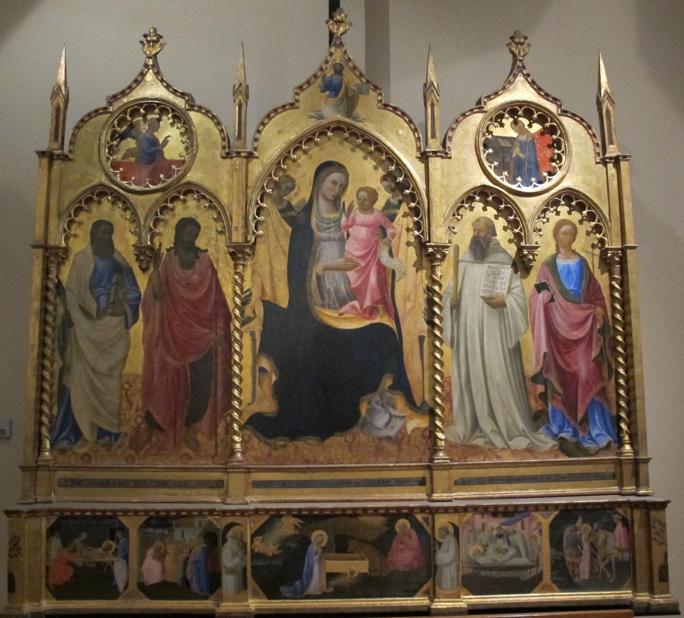 Andrea di giusto, polittico con madonna e santi, 1455